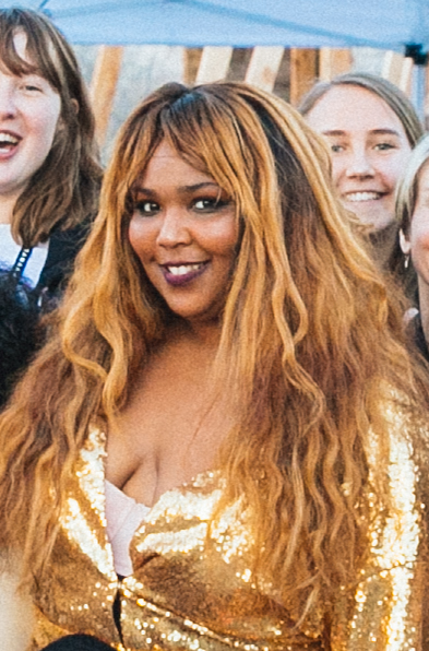 Peter_Lovera_Treefort2017-256